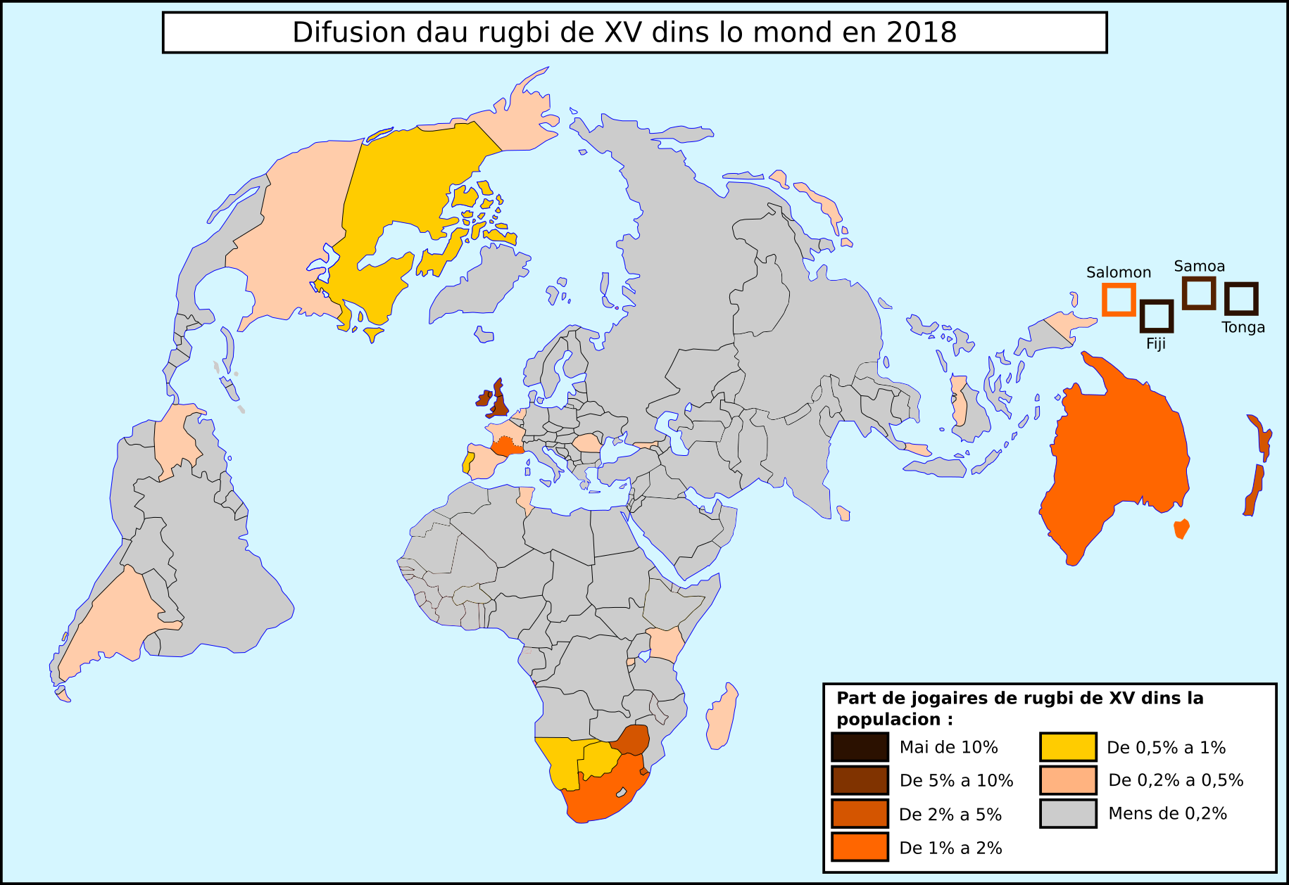 Rugbi de XV - Part de jogaires dins la populacion (2018).